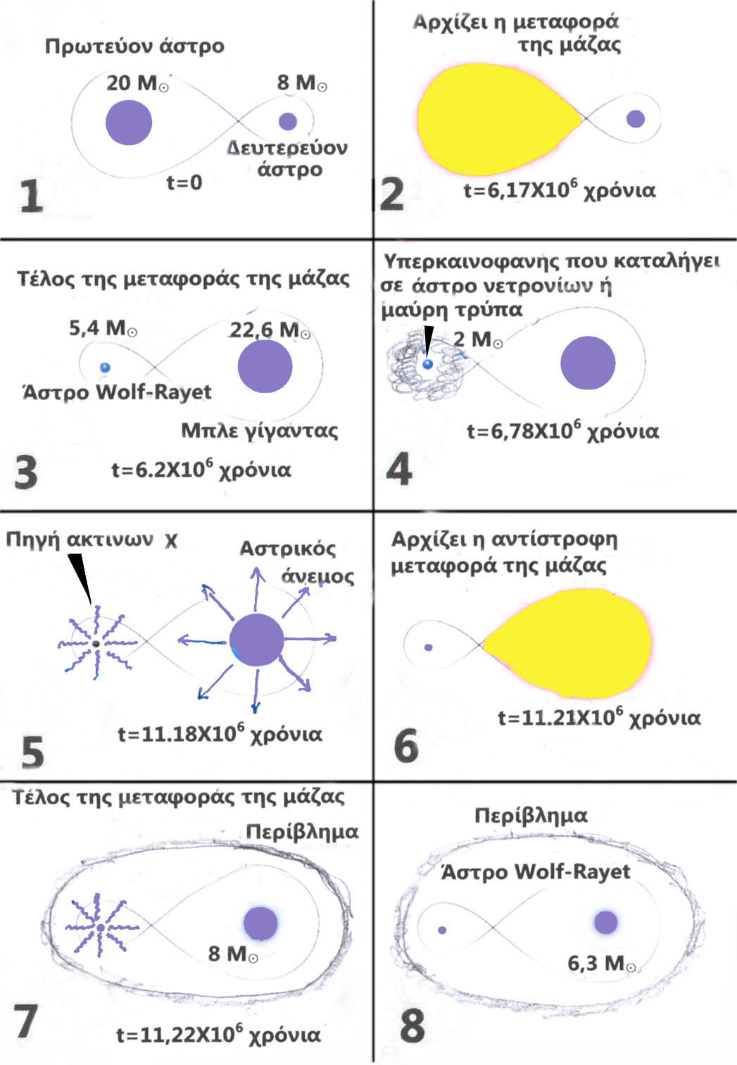 Η εξέλιξη ενός διπλού αστρικού συστήματος Wolf-Rayet